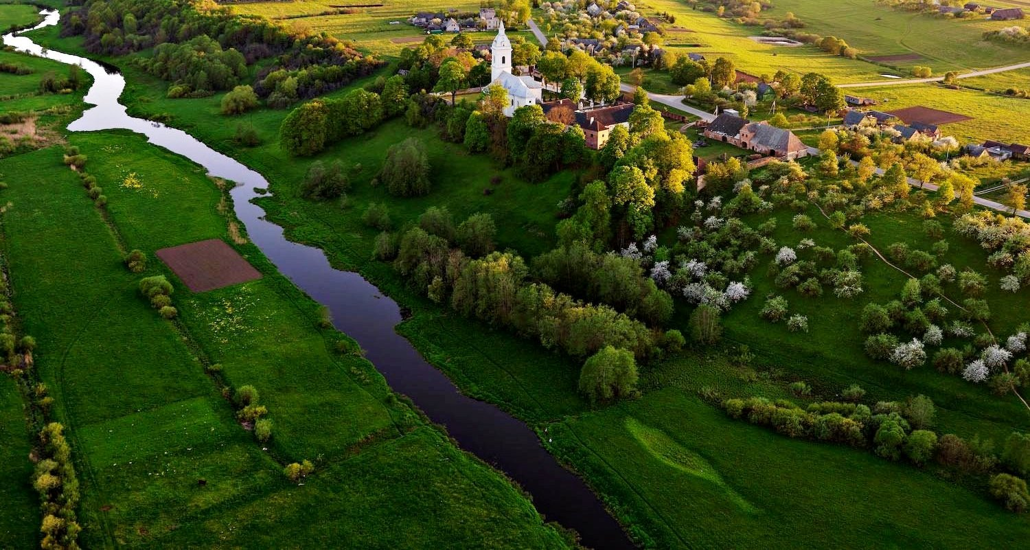 Palėvenės vienuolyno ansamblis